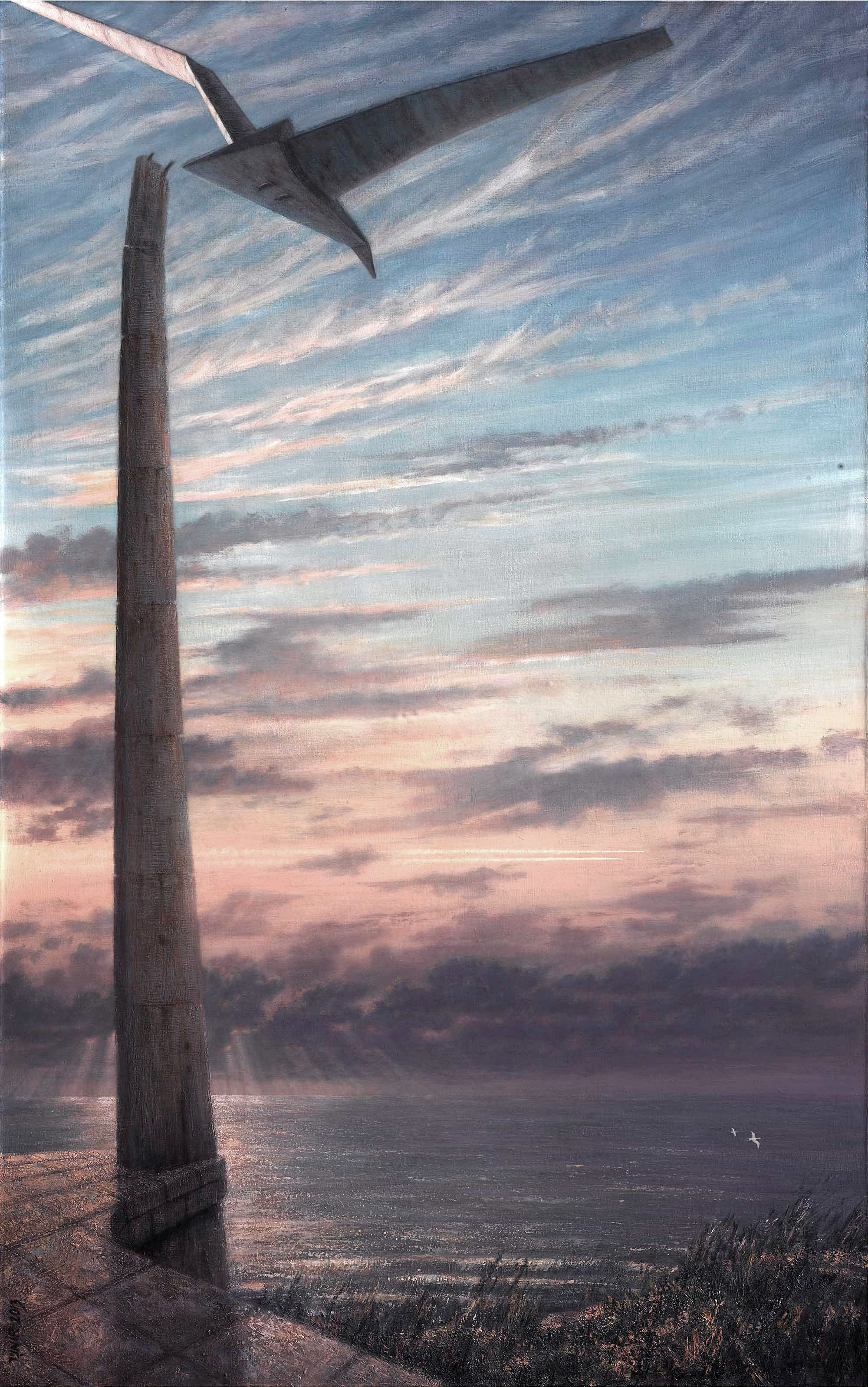 לחופש נולד, אקריליק על בד 215 על 140